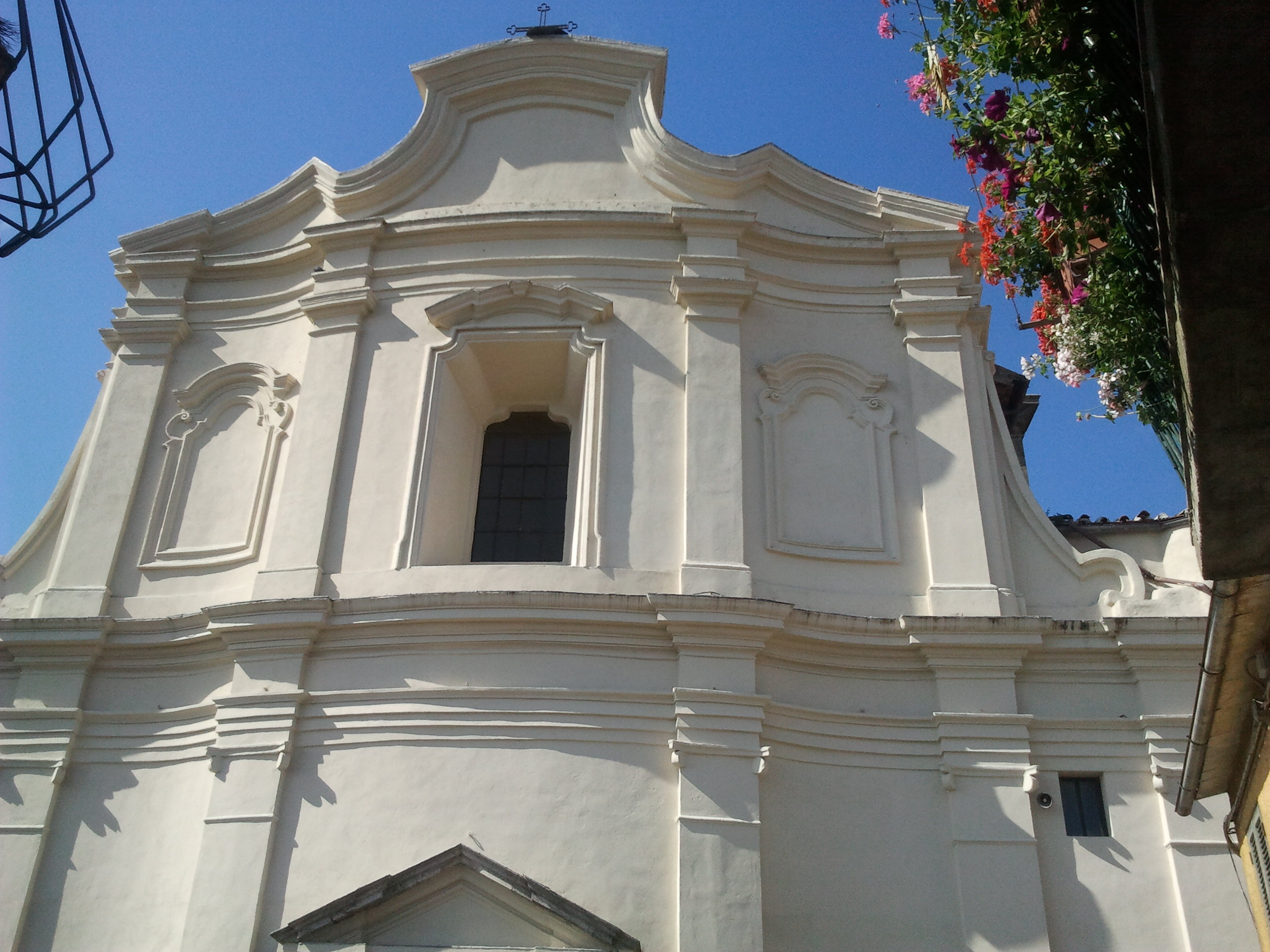 Il Duomo di S. Ermete Martire si trova sotto la diocesi di Acquapendente e le sue prime notizie risalgono agli inizi del 1500.